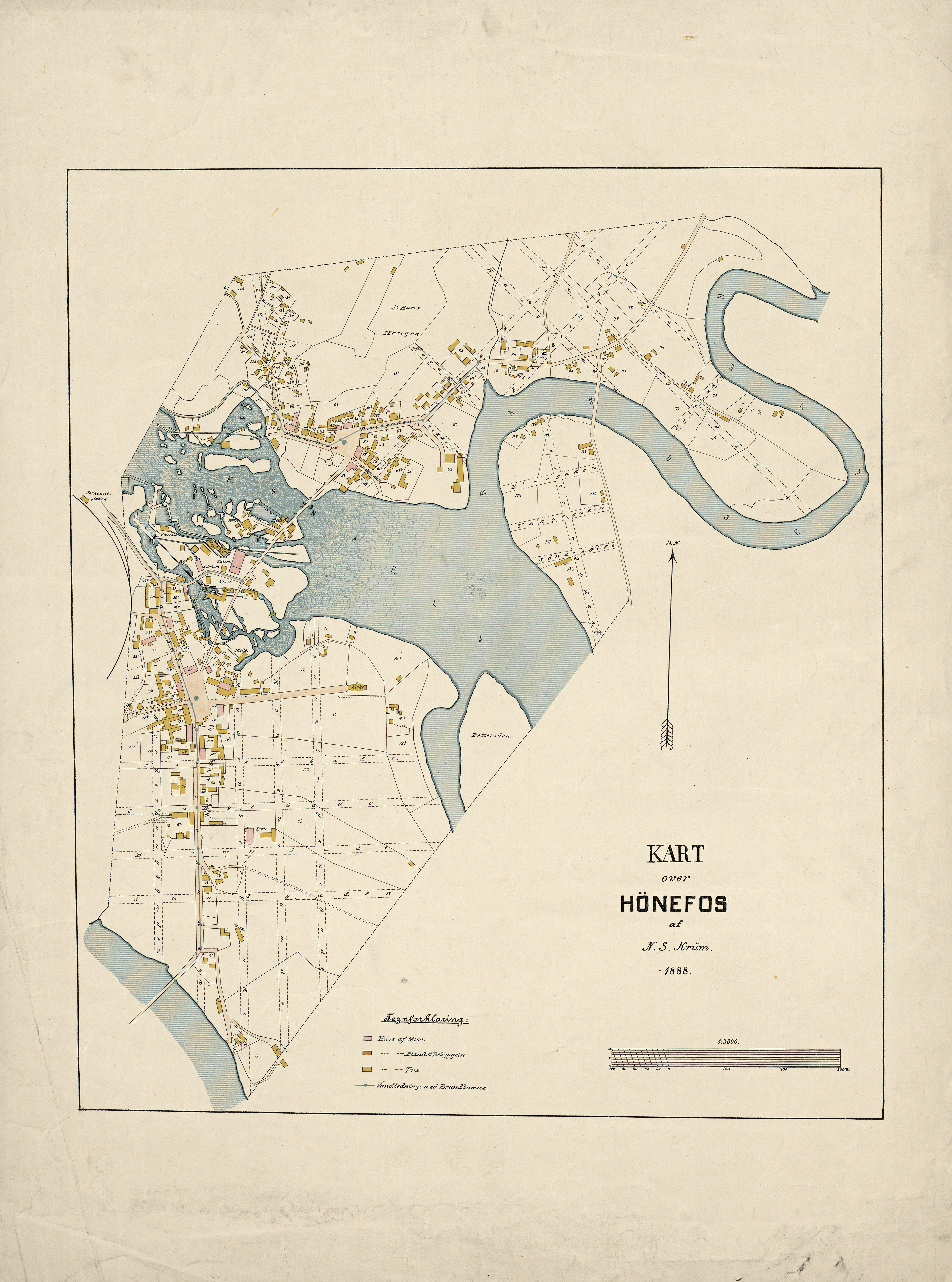 Kart over Hønefos (1888)